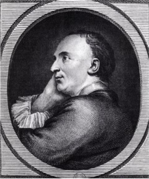 Gravure représentant Denis Diderot exécutée par Pierre Chenu d'après un dessin de Jean-Baptiste Garand (vers 1760).